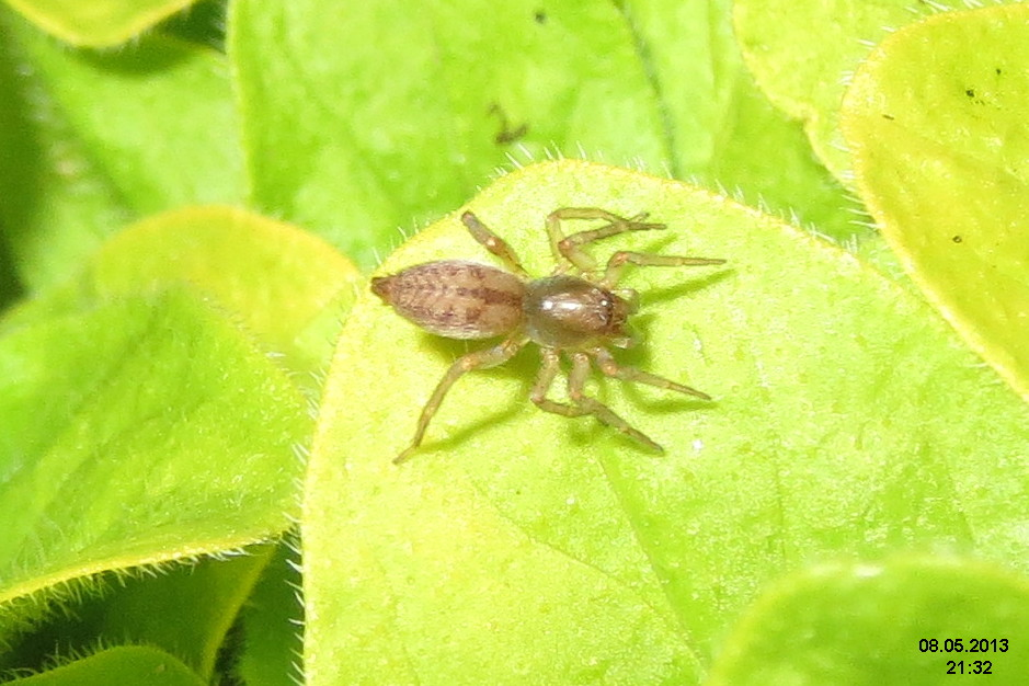 Spiderling (BG)